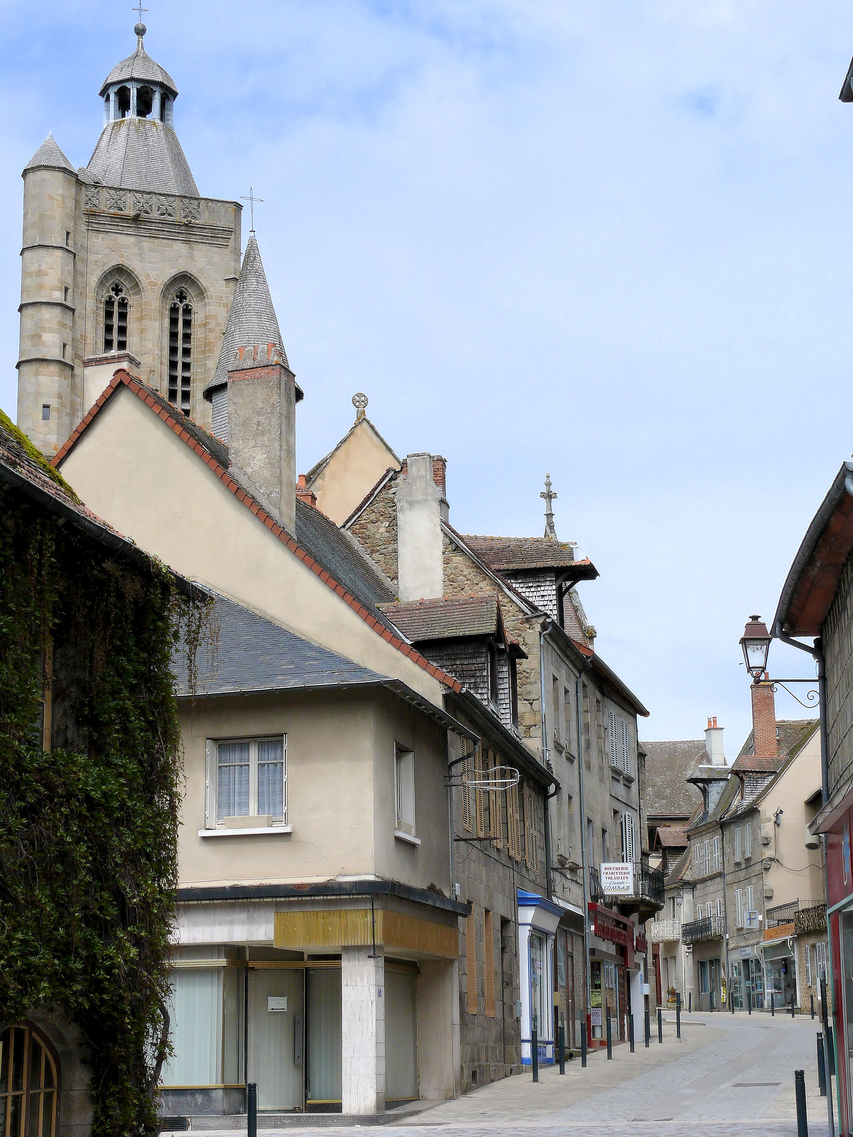 Felletin - Grande Rue